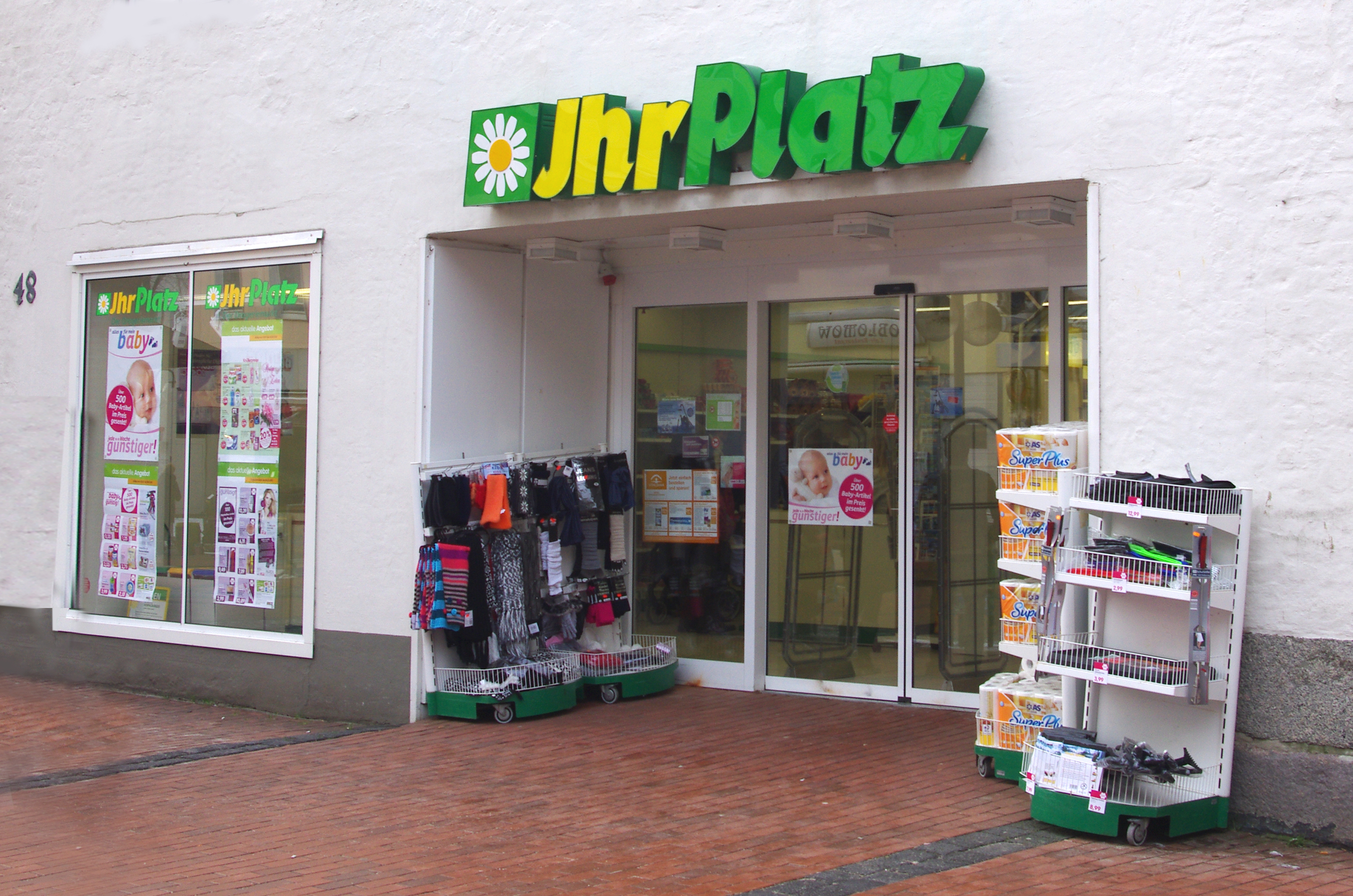 Ein Geschäft der Drogeriemarktkette "Ihr Platz"